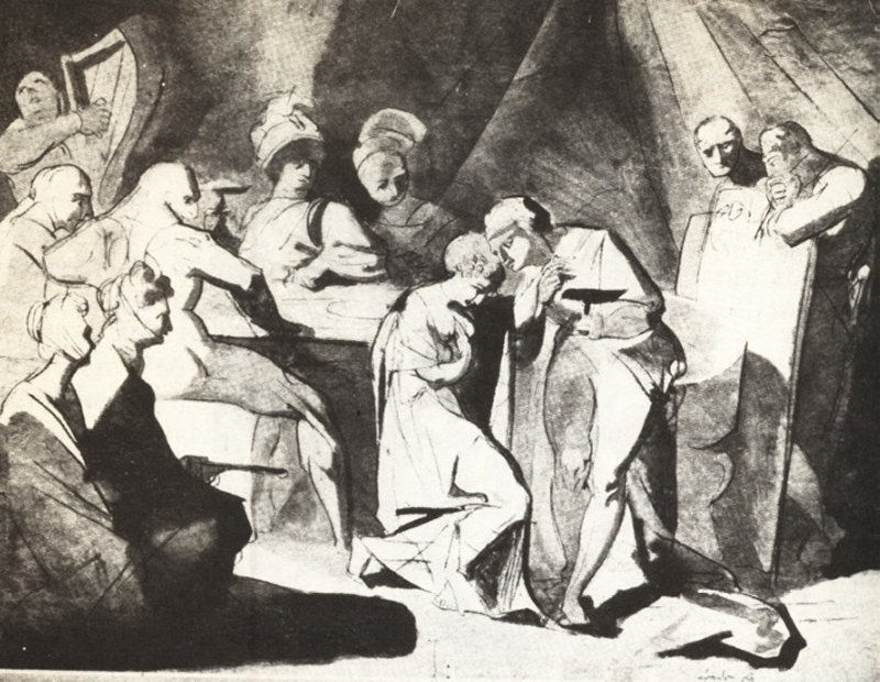 Johann Heinrich Füssli: Bardo tocando el arpa (1769), Colección Bollag, Zürich.